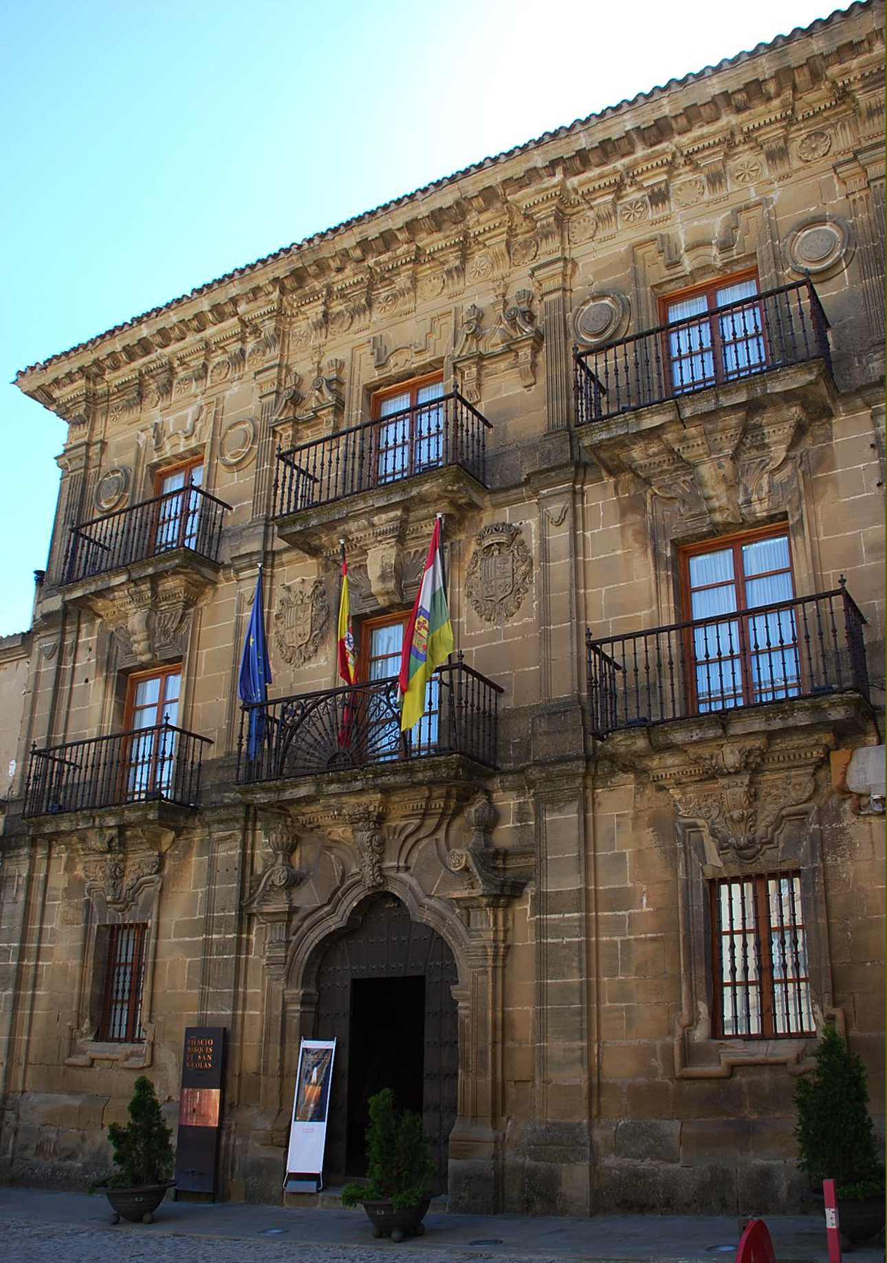 Palacio del Marqués de San Nicolás en Briones (La Rioja - España).